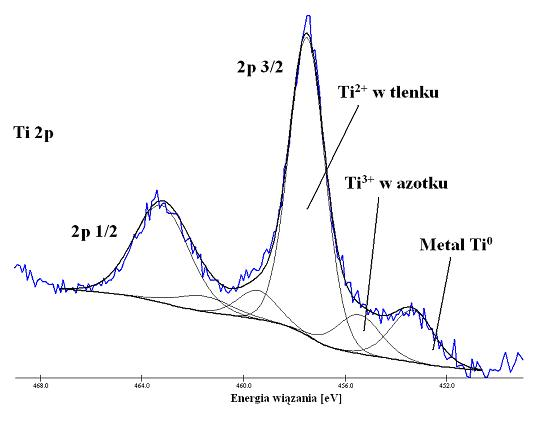 Widmo szczegółowe tytany z pracy inżynierskiej pod tytułem "Struktura i właściwości powłok nanoszonych na protezy stawów techniką natryskiwania naddźwiękowego". Widmo zebrane z powierzchni powłoki Ti/TiC naniesionej metodą natryskiwania na zimno (CGS)